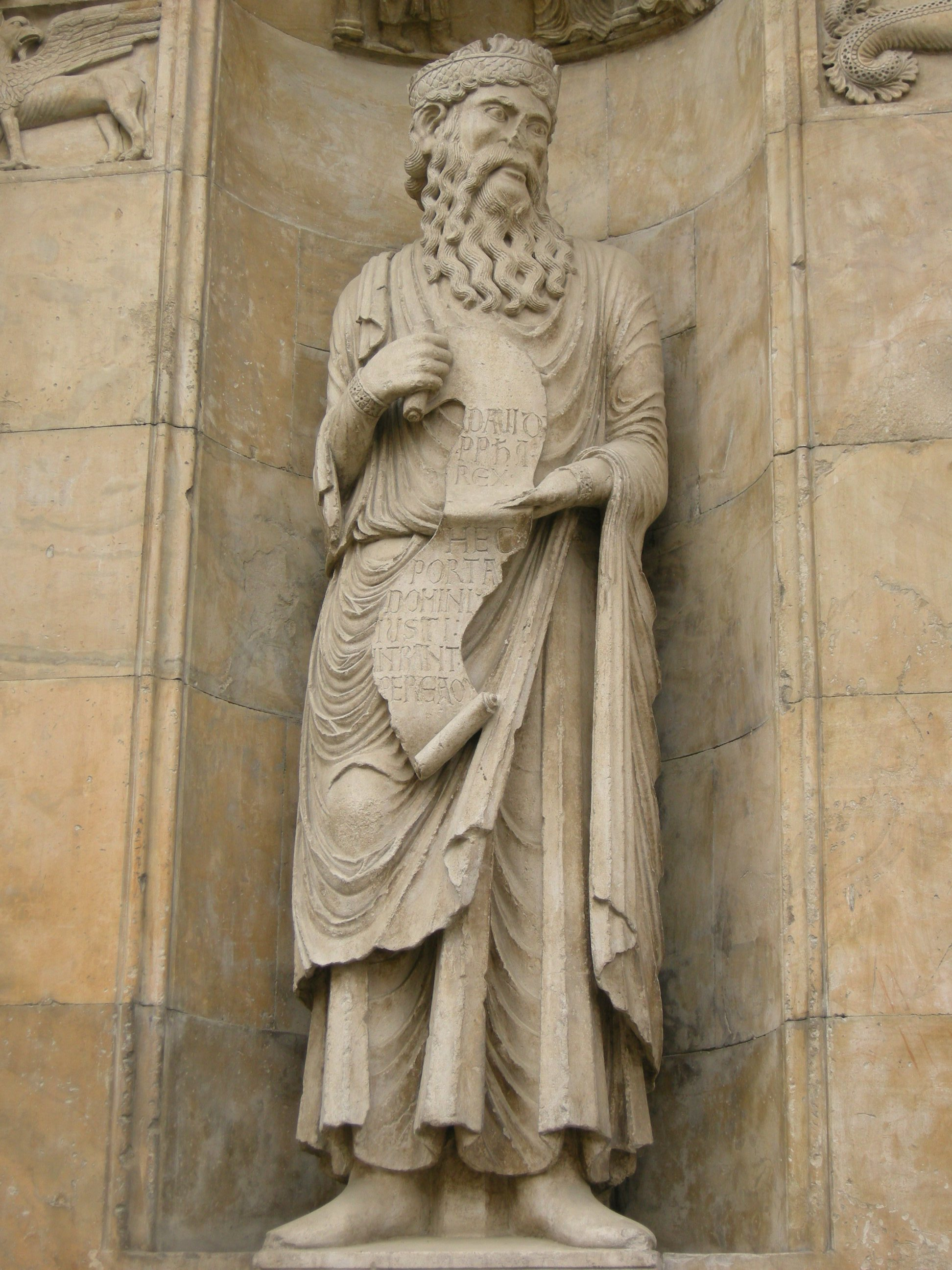 Duomo di fidenza, sculture a sx del portale c.le, re davide, attr. benedetto antelami